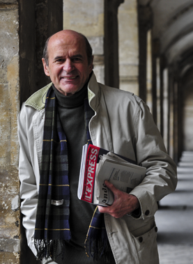 Gilbert Grellet, place des Vosges en 2016